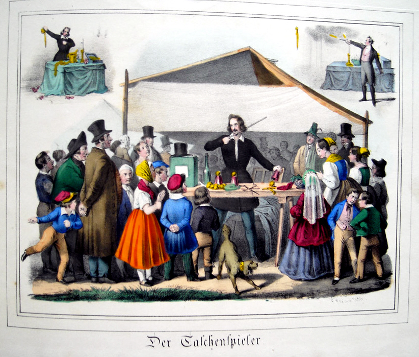 Der Taschenspieler. Aus: Der Jahrmarkt, Sehenswürdigkeiten und Scenen in bunter Reihe. Ein Bilderbuch mit Text von Zweien. 18 Bl. Mit 18 kolorierten lithographischen Tafeln von Friedrich Bernhard Elias nach Zeichnungen von Johann Friedrich Schlotterbeck. 21 x 26,5 cm. J. F. Schreiber, Esslingen [1843].